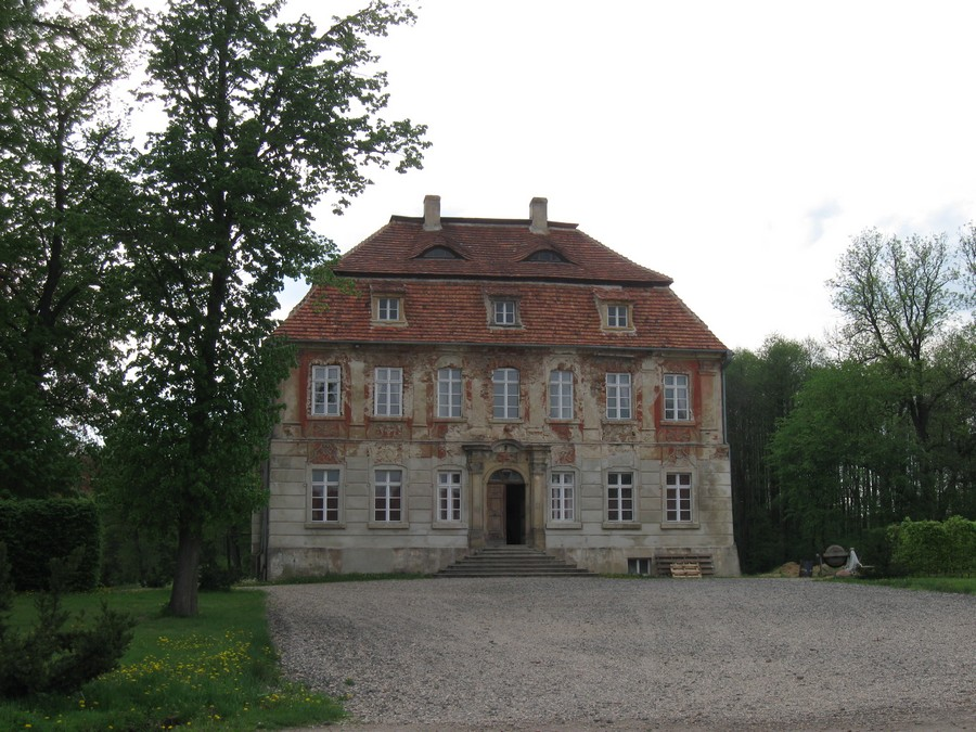 Krzeczyn Mały - pałac (zabytek nr A/2994/480/L z 29.03.1977)